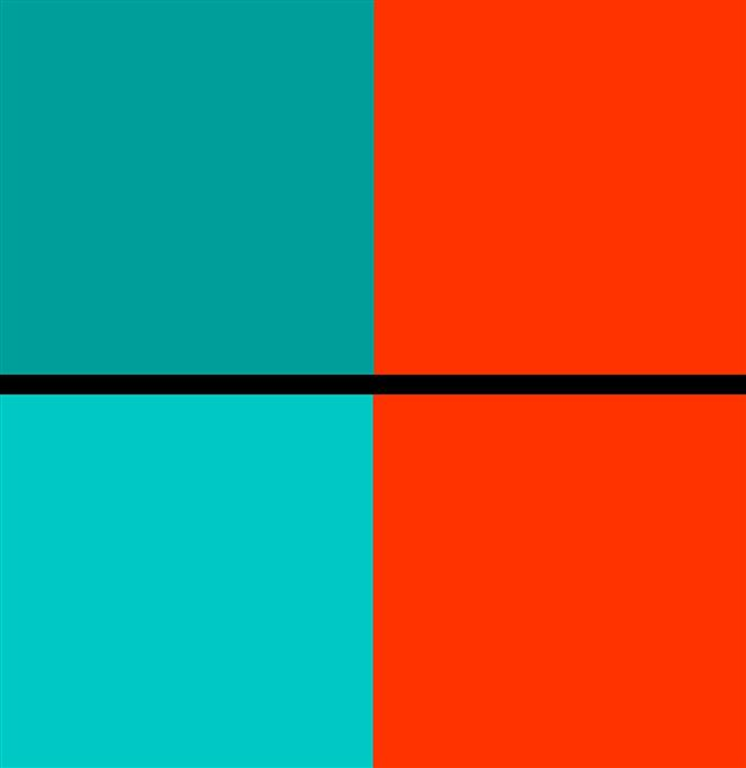 Kalt-Warm-Kontrast: Nach Johannes Itten bilden die kalte Farbe Blaugrün und die warme Farbe Rotorange den stärksten Kalt-Warm-Kontrast. Ebenso gut lässt sich aber auch ein helles Blaugrün als die kalte Farbe neben das Rotorange stellen. Allerdings entsteht dann gleichzeitig ein Hell-Dunkel-Kontrast.